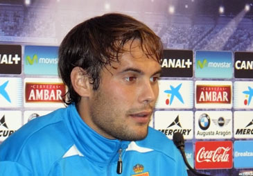 Adán Pérez